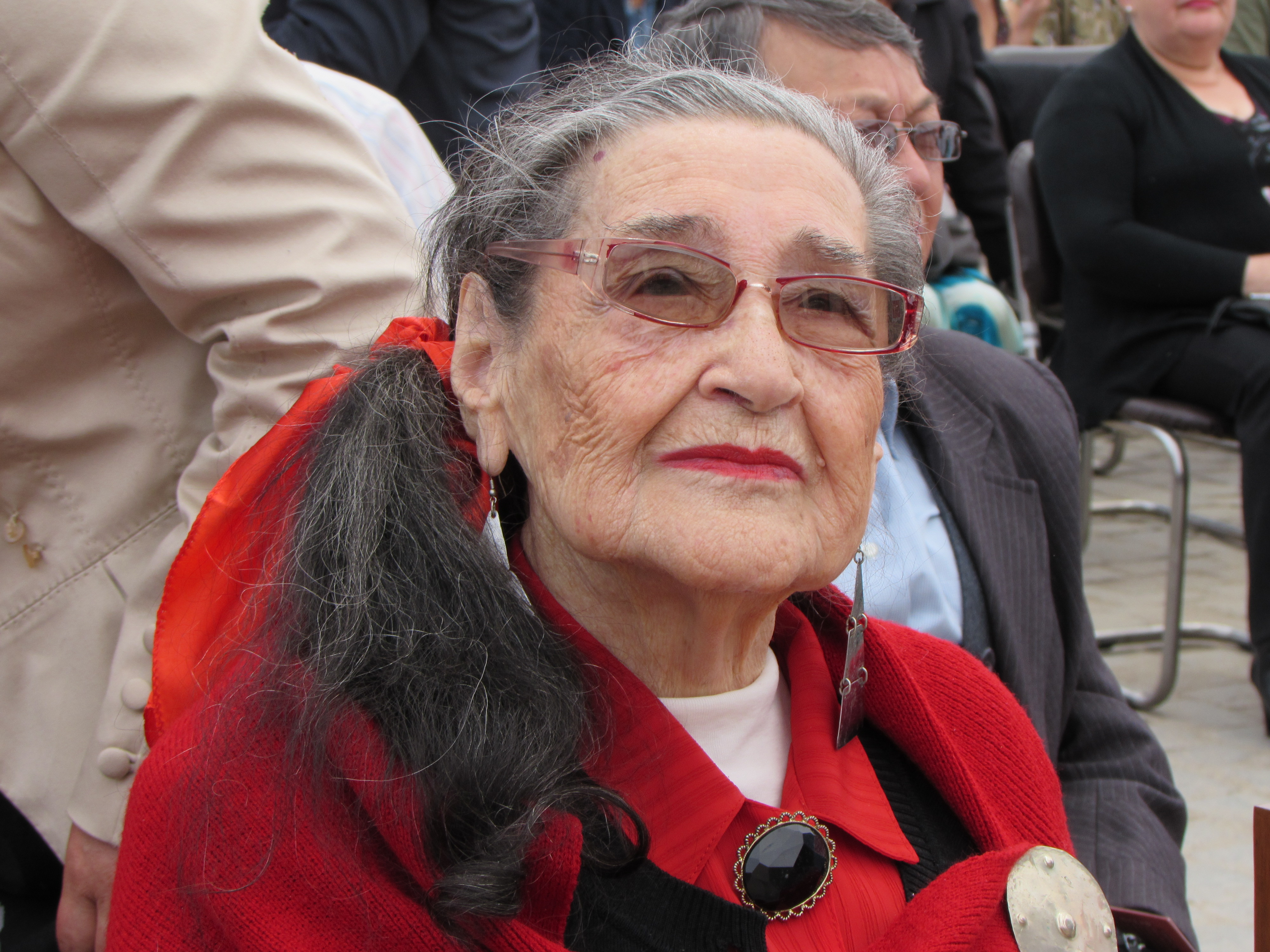 Margot Loyola en la inauguración de la exposición «Un poco campesina, un poco maestra, un poco cantora» organizada por el Museo Nacional de Chile en 2014.